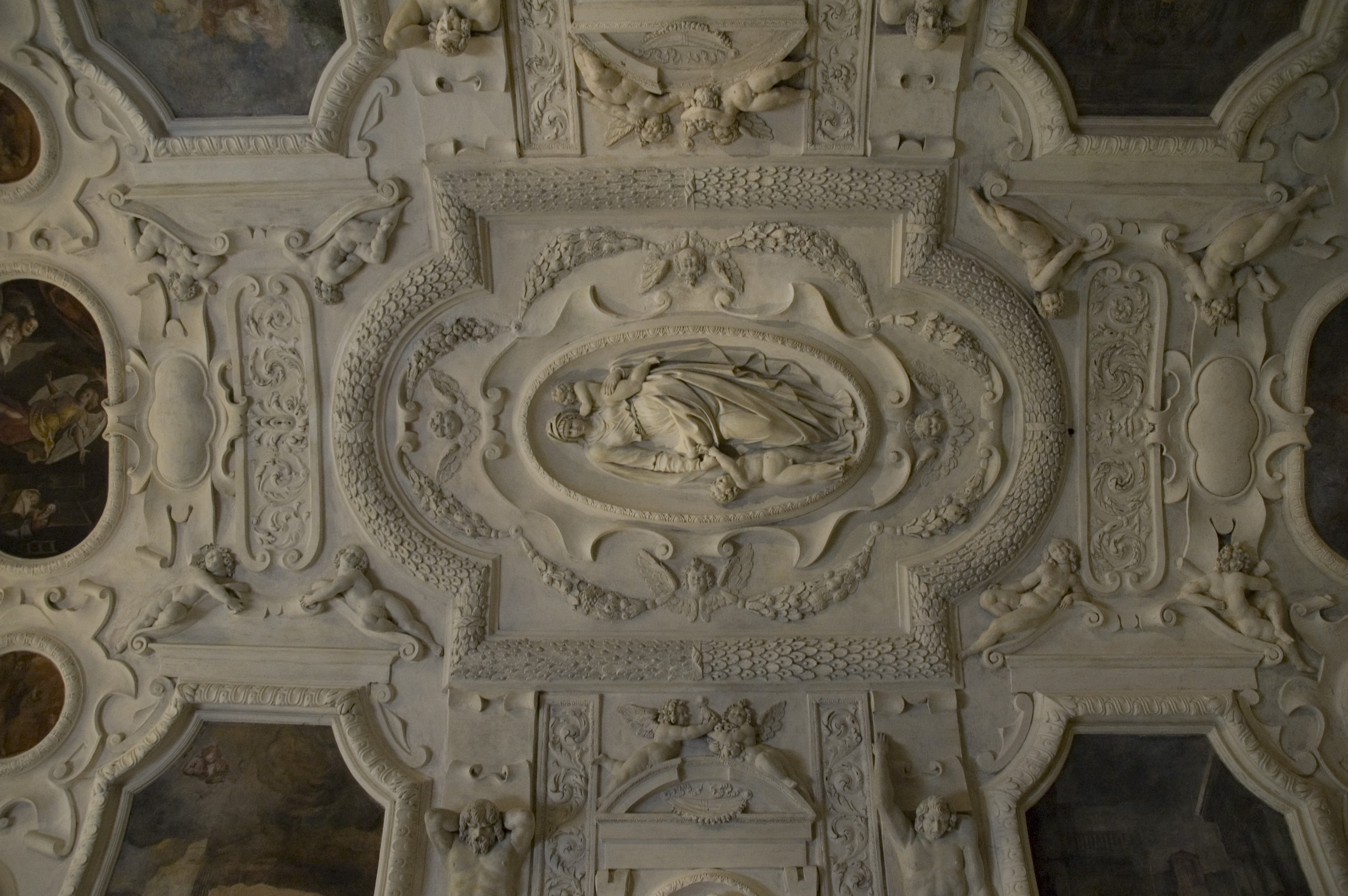 Détail du Plafond de l'église saint Joseph de Cagli, Marches, Italie